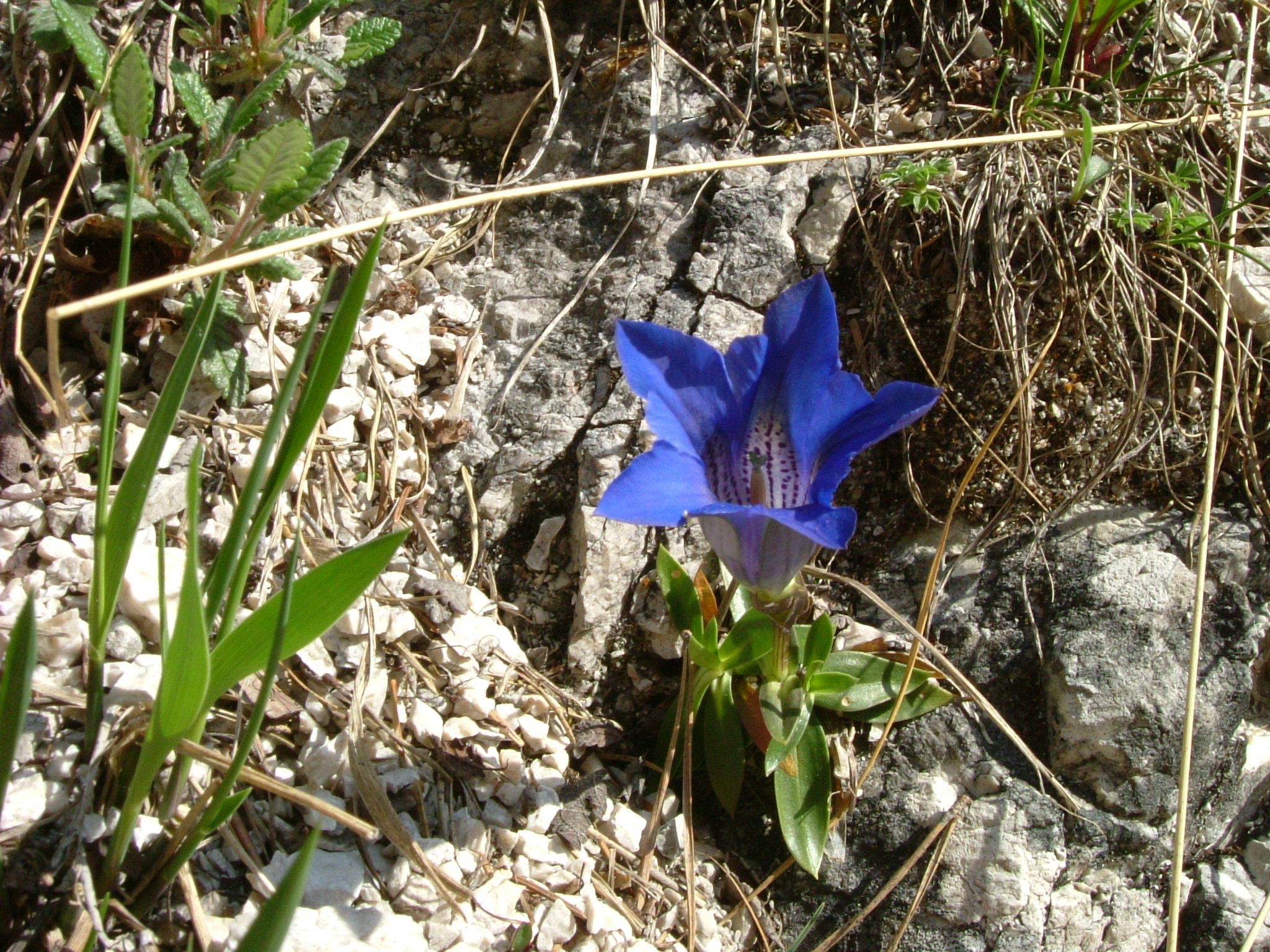 Clusius-Enzian im oberen Teil der Almbachklamm (Berchtesgadener Land)